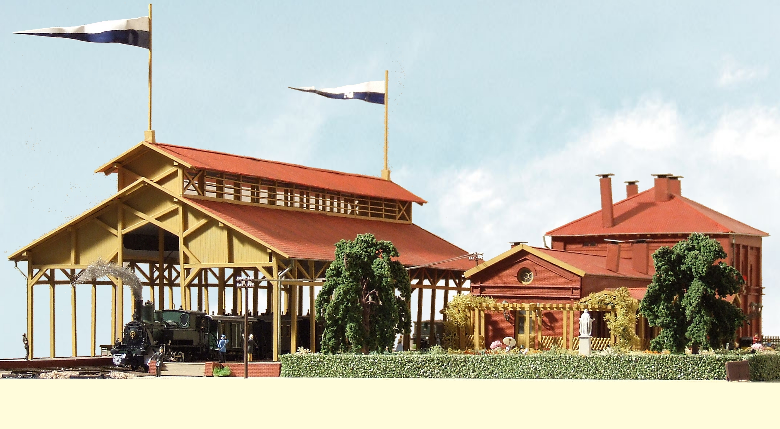 Ansicht Alter Bahnhof Landshut von Nordwesten - Modell im Maßstab 1:87 - Gebaut 2011 von Thorsten Hambusch, Landshut